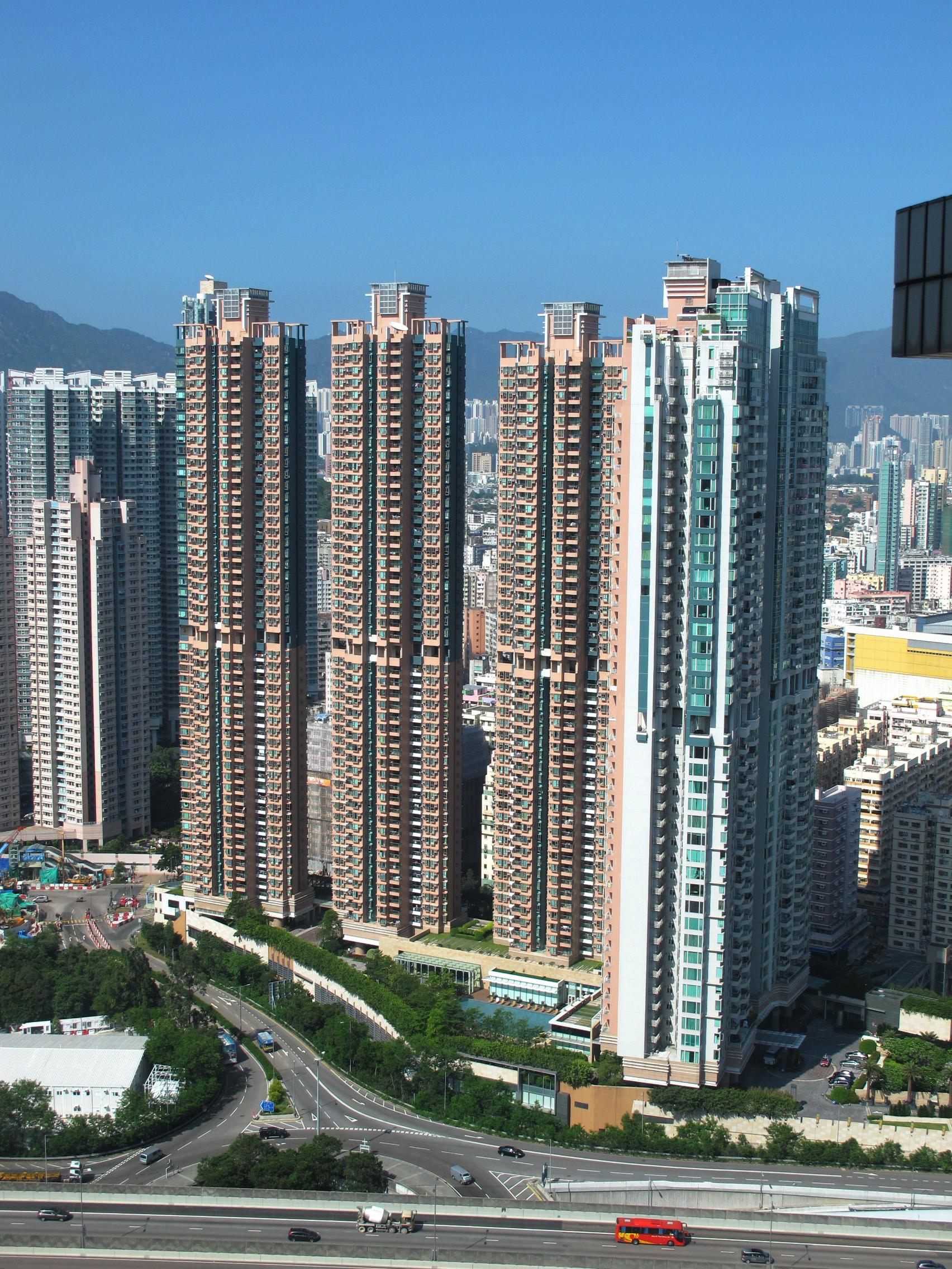 Harbour Green